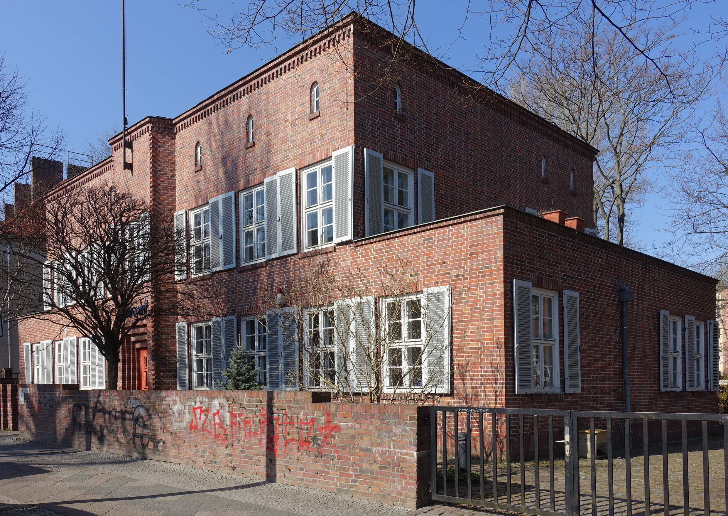 ehem. Lehrerwohnhaus heute Standesamt